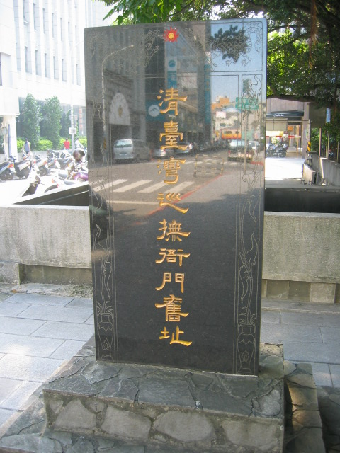 清臺灣巡撫衙門舊址碑正面，1983年4月臺北市文獻委員會立，2006年7月20日mingwangx攝。 Taiwan Xun-fu Ya-men Jiu-zhi, taken by mingwangx at July 20th, 2006.